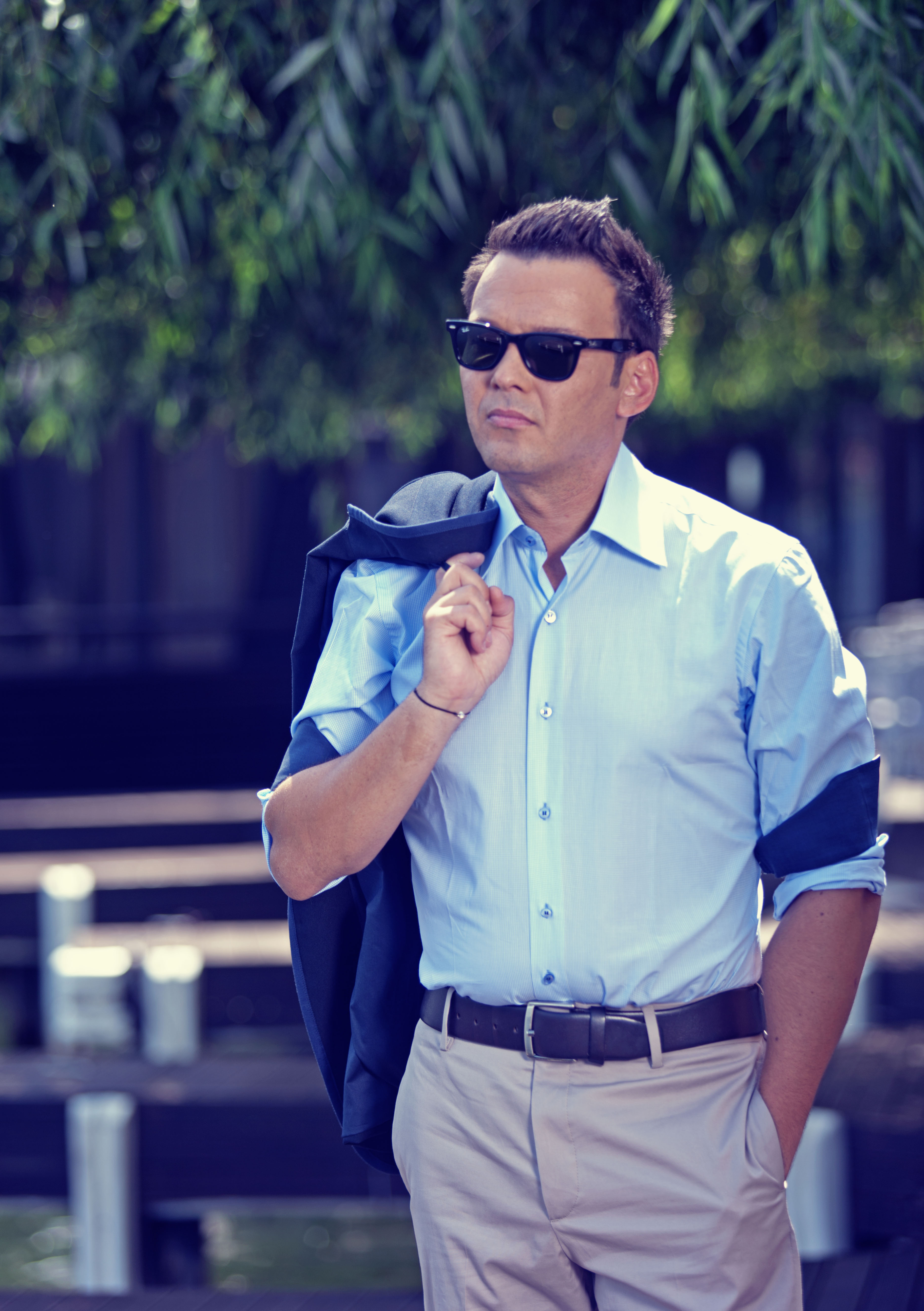 Sedinta foto "La Vita e Bella"